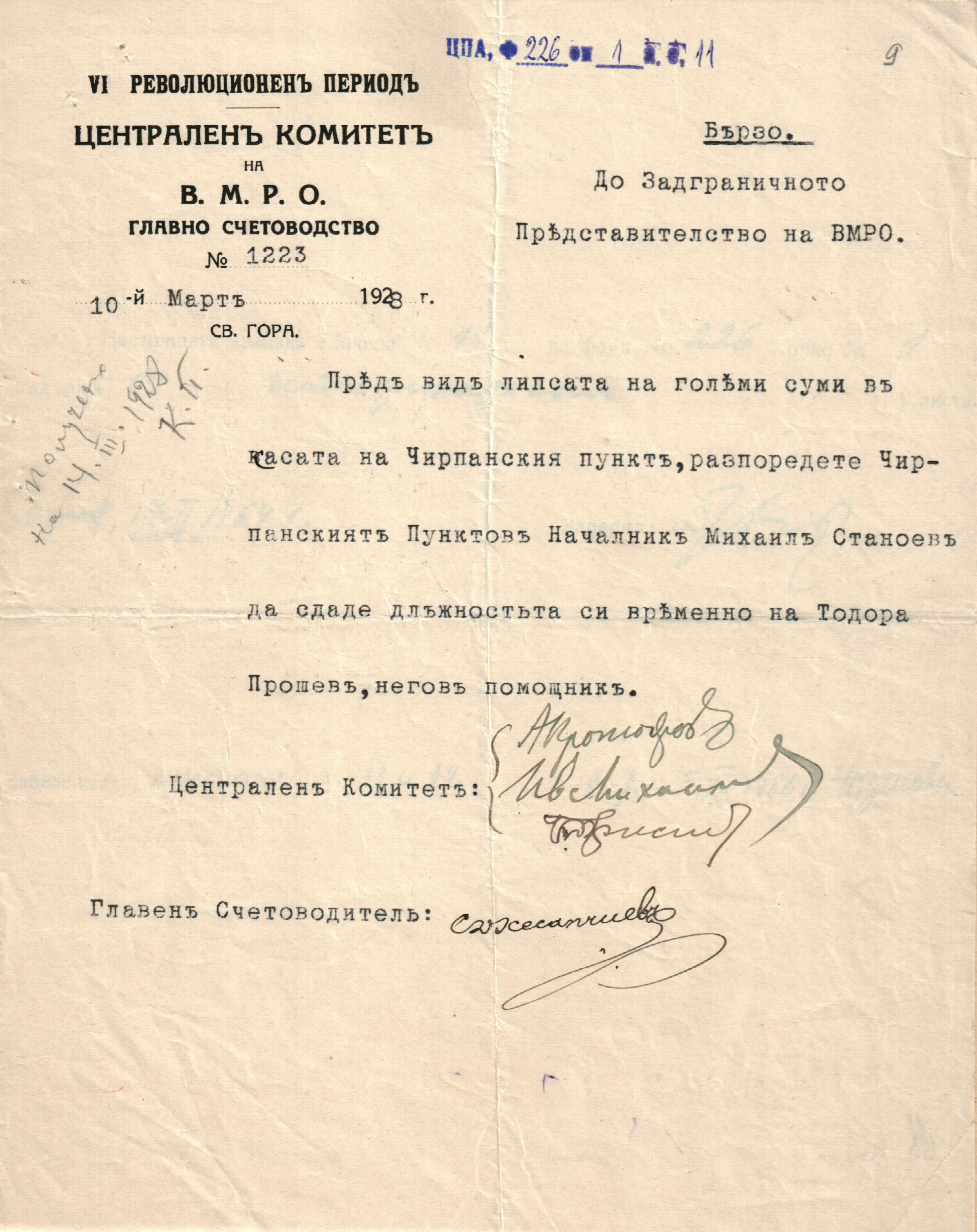 Писма, прокламации и бележки на ЦК и ЗП на ВМРО-благодарствено писмо до Анри Барбюс, взаимоотношениата с българското правителство, разпределение на работата между сътрудниците в ЗП и др.